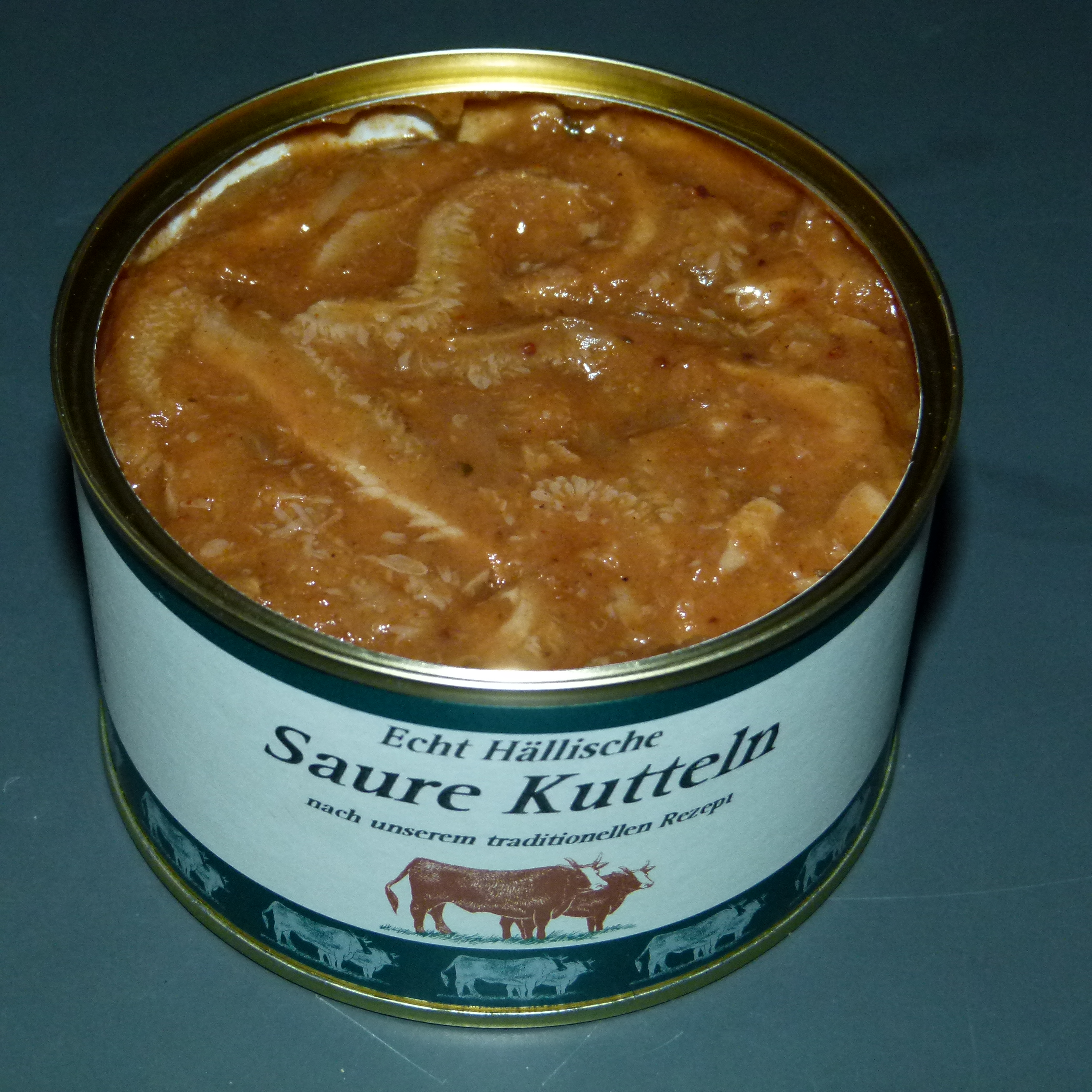 Schwäbische "Saure Kutteln", Bauernmarkt Schwäbisch Hall bei Stuttgart